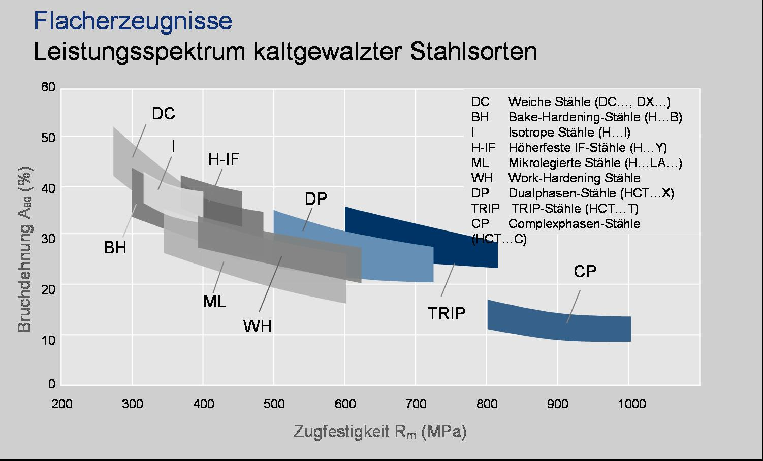 Festigkeits-Dehnungsbereiche moderner kaltgewalzter Kohlenstoffstähle